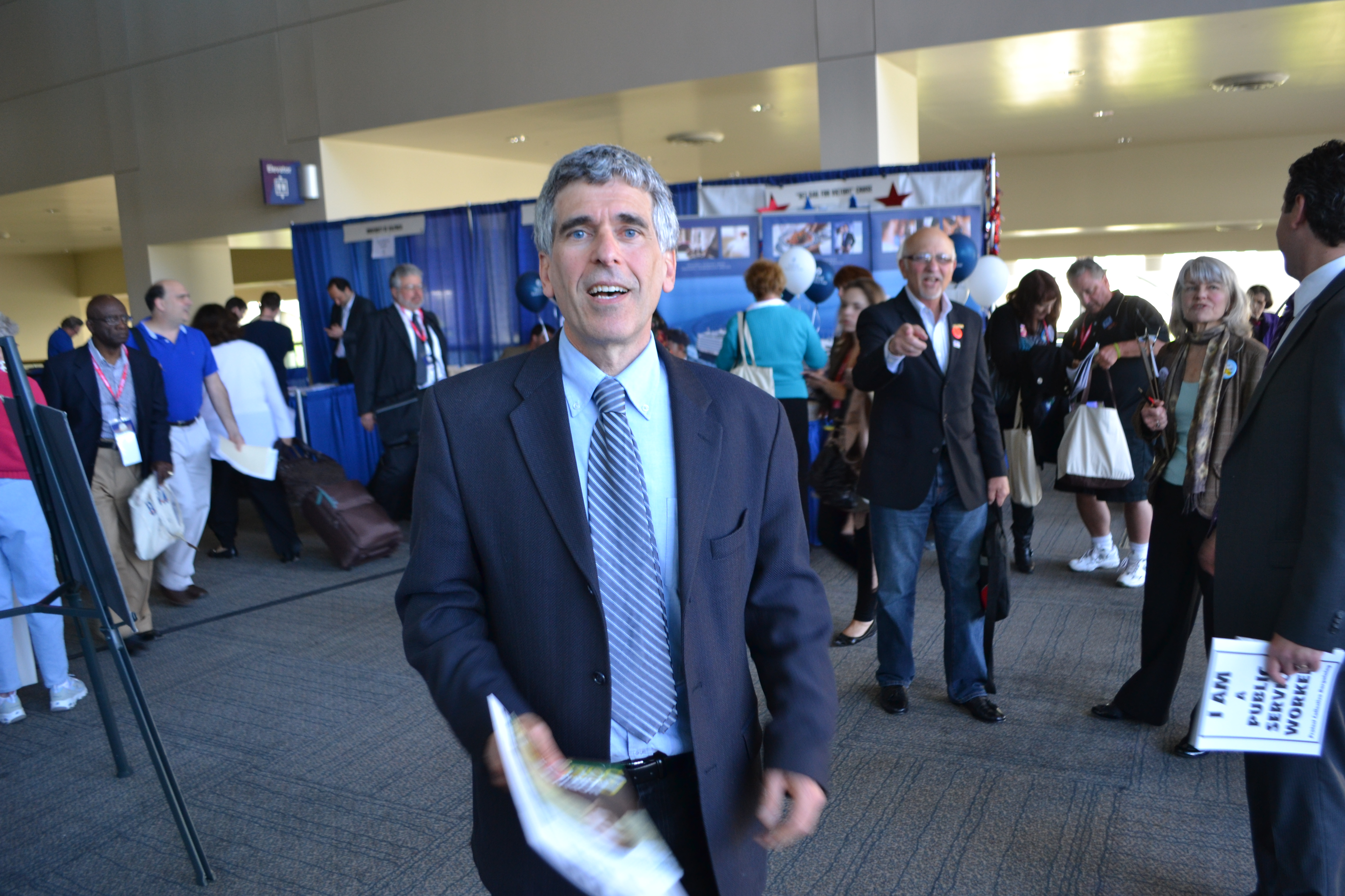 Progressive Norman Solomon, CA-6 candidate